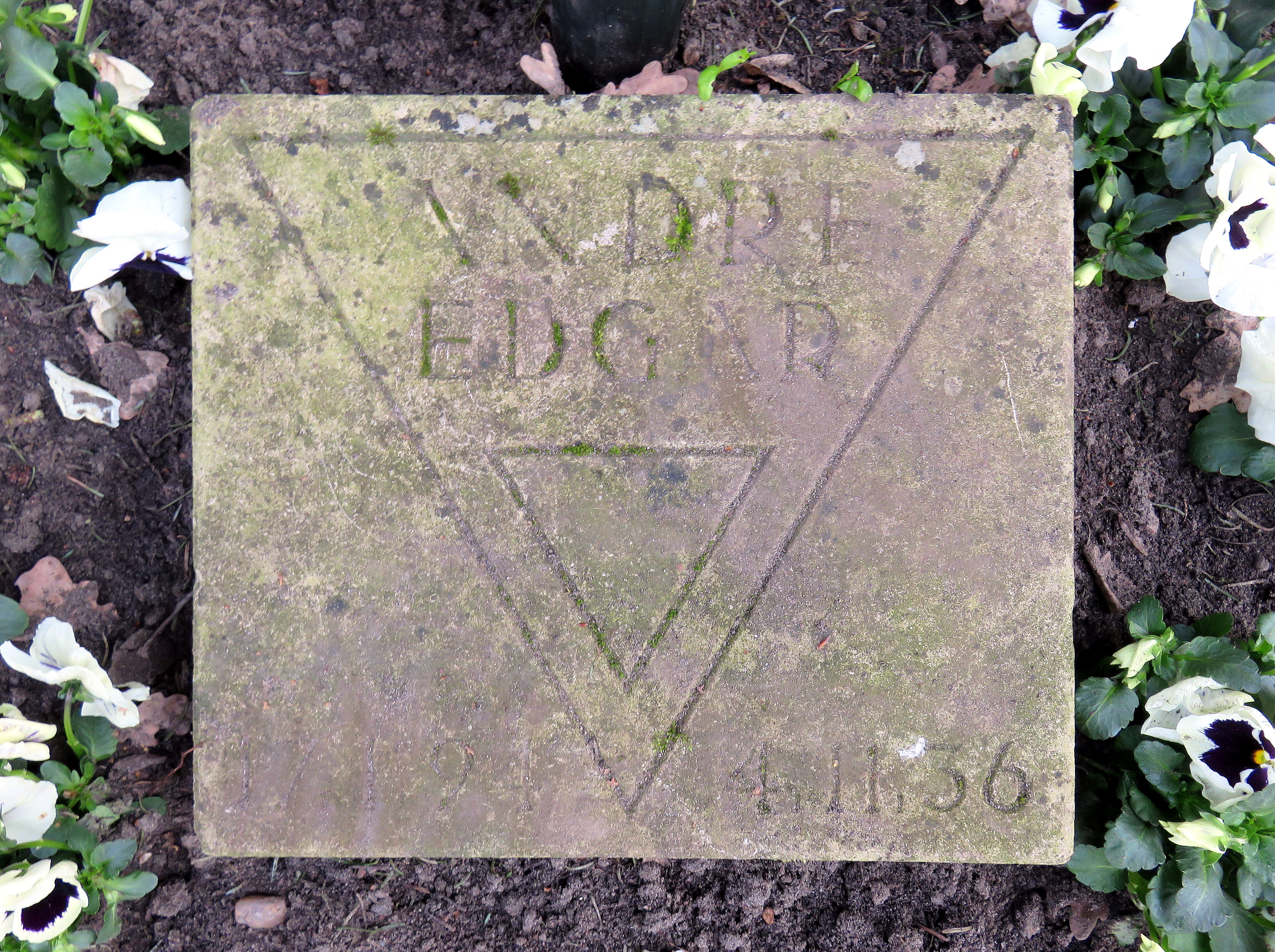 Kissenstein für den deutschen Widerstandskämpfer Edgar Andre im Ehrenhain Hamburgischer Widerstandskämpfer, Friedhof Ohlsdorf, Planquadrat K 5 (Bergstraße gegenüber dem Museum).